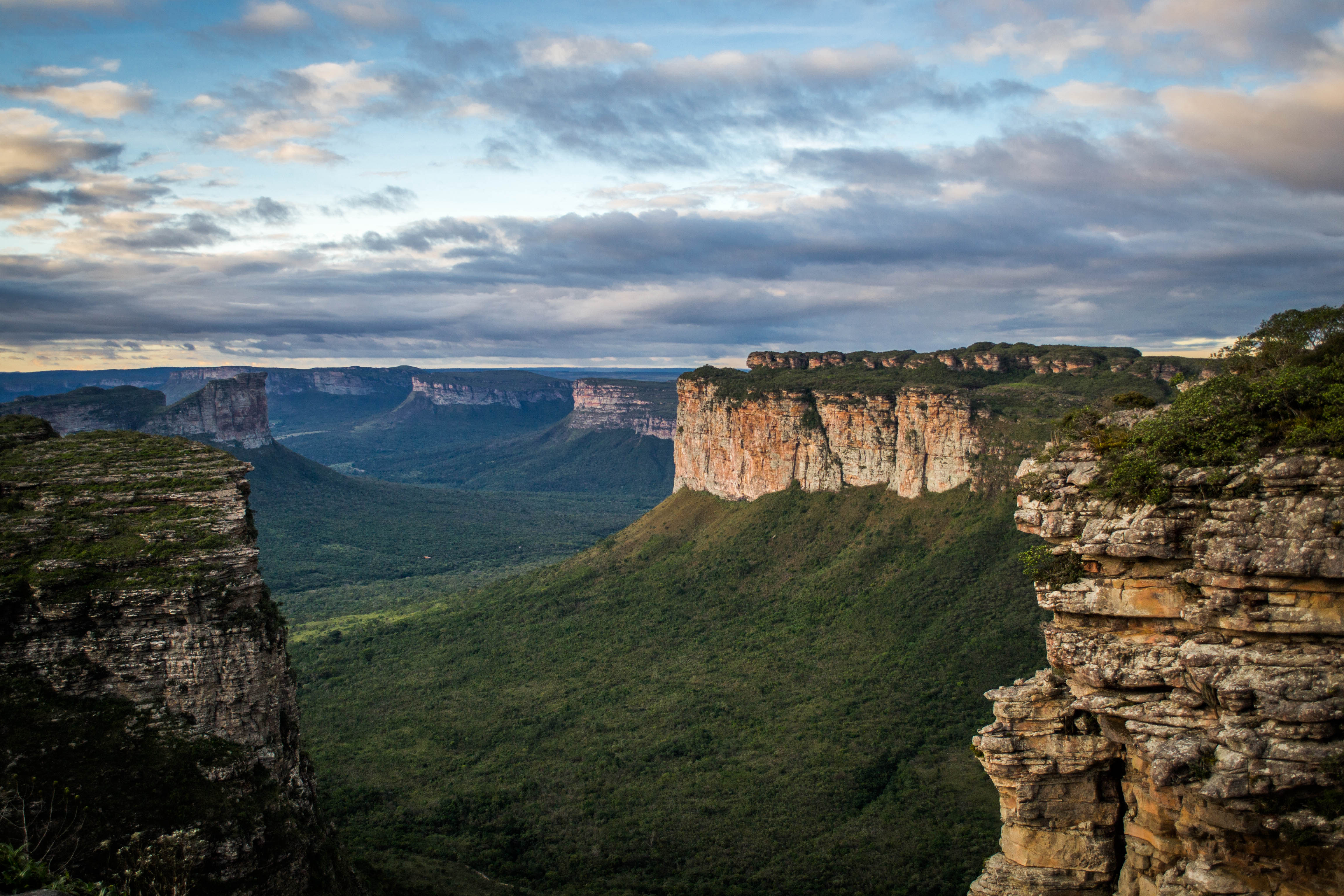 Vista do Morro do Pai Inácio, na Chapada Diamantina/BA.